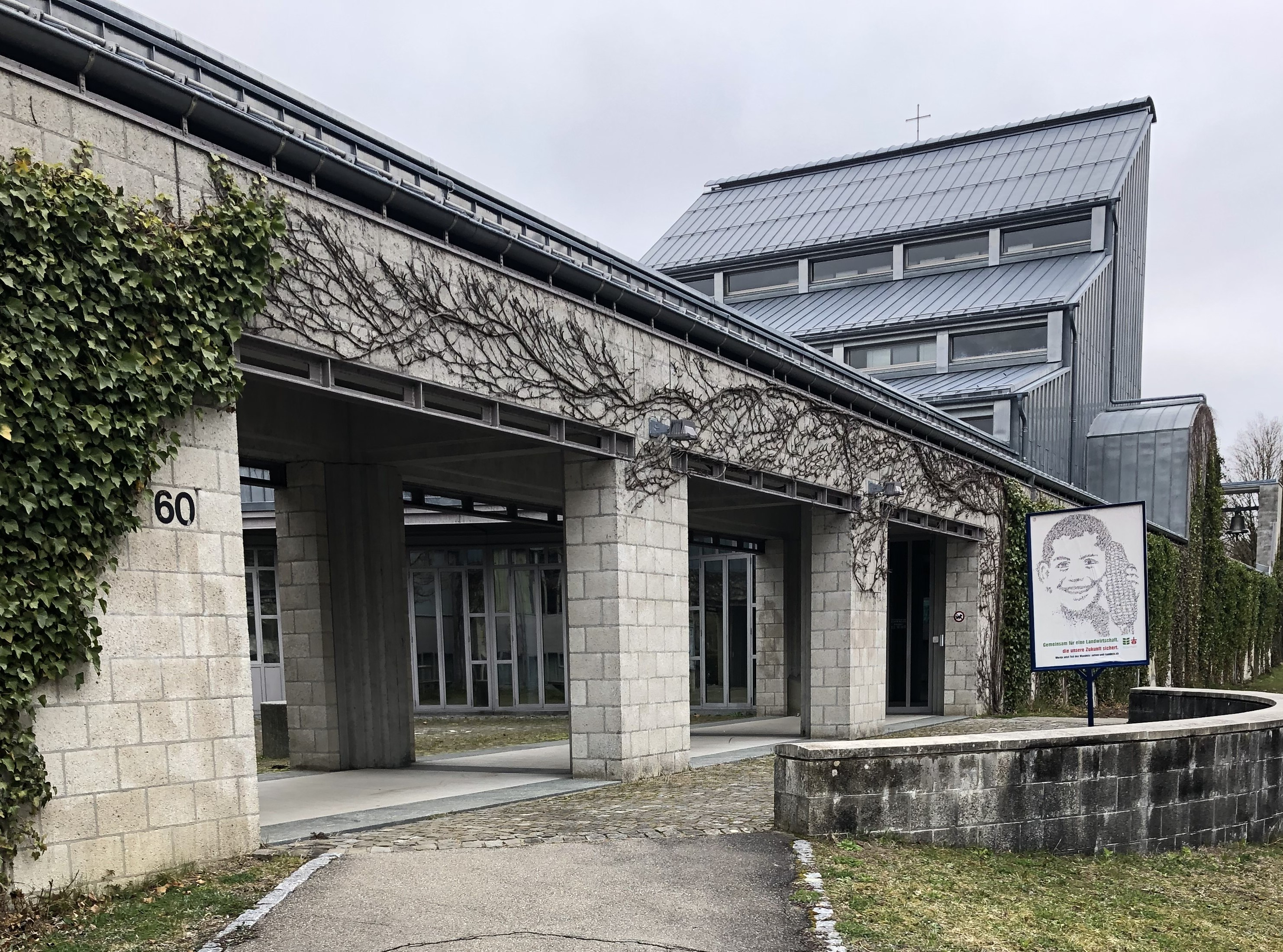 Ackerli Katholische Pfarrei St. Mauritius Eingang